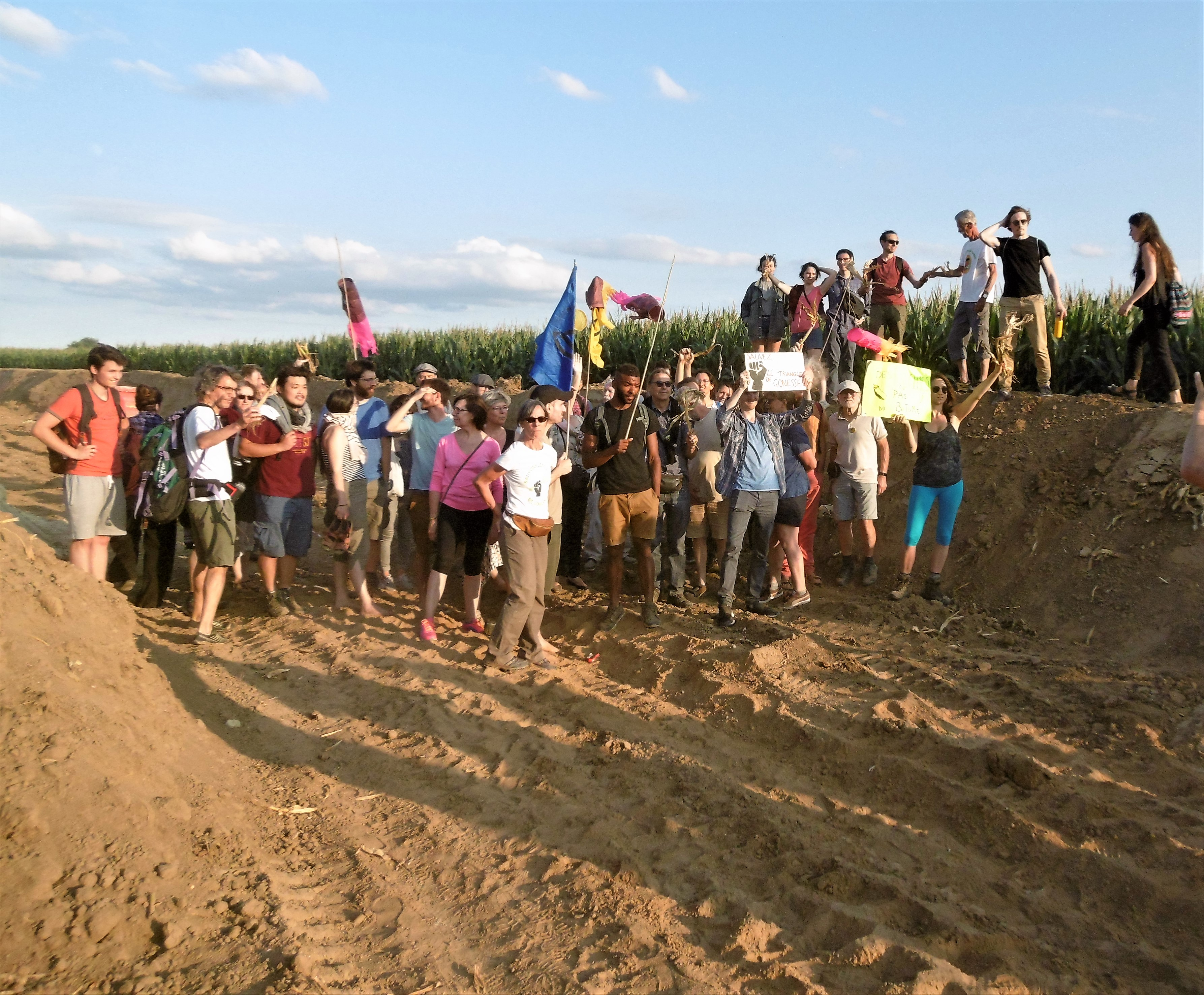 Visite du site du chantier des travaux préparatoires à la station de la ligne 17 le 13 juillet 2019